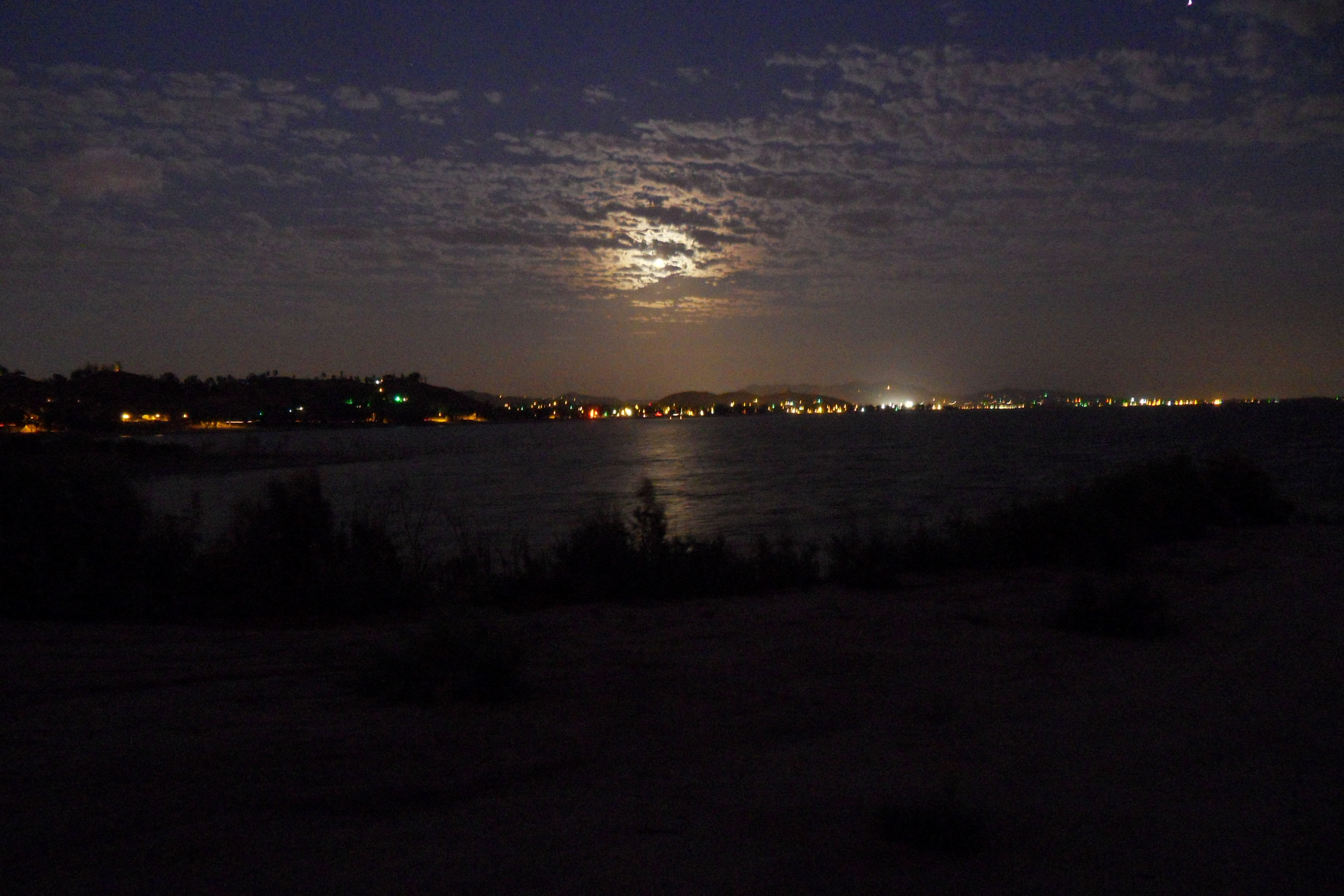 Lake Elsinore in de avond.